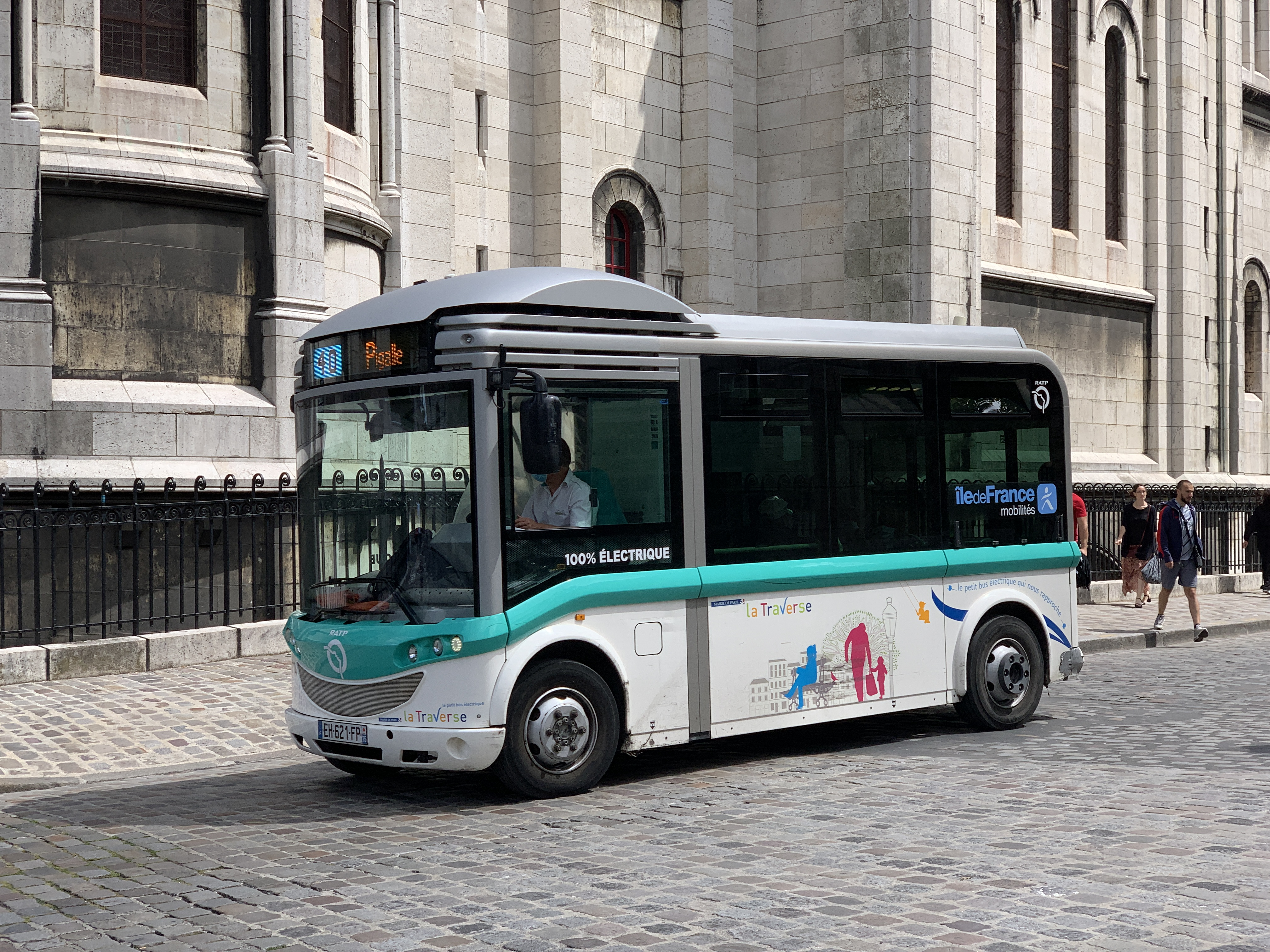 Navette de la ligne 40 de la RATP, rue du Chevalier de la Barre, Paris.